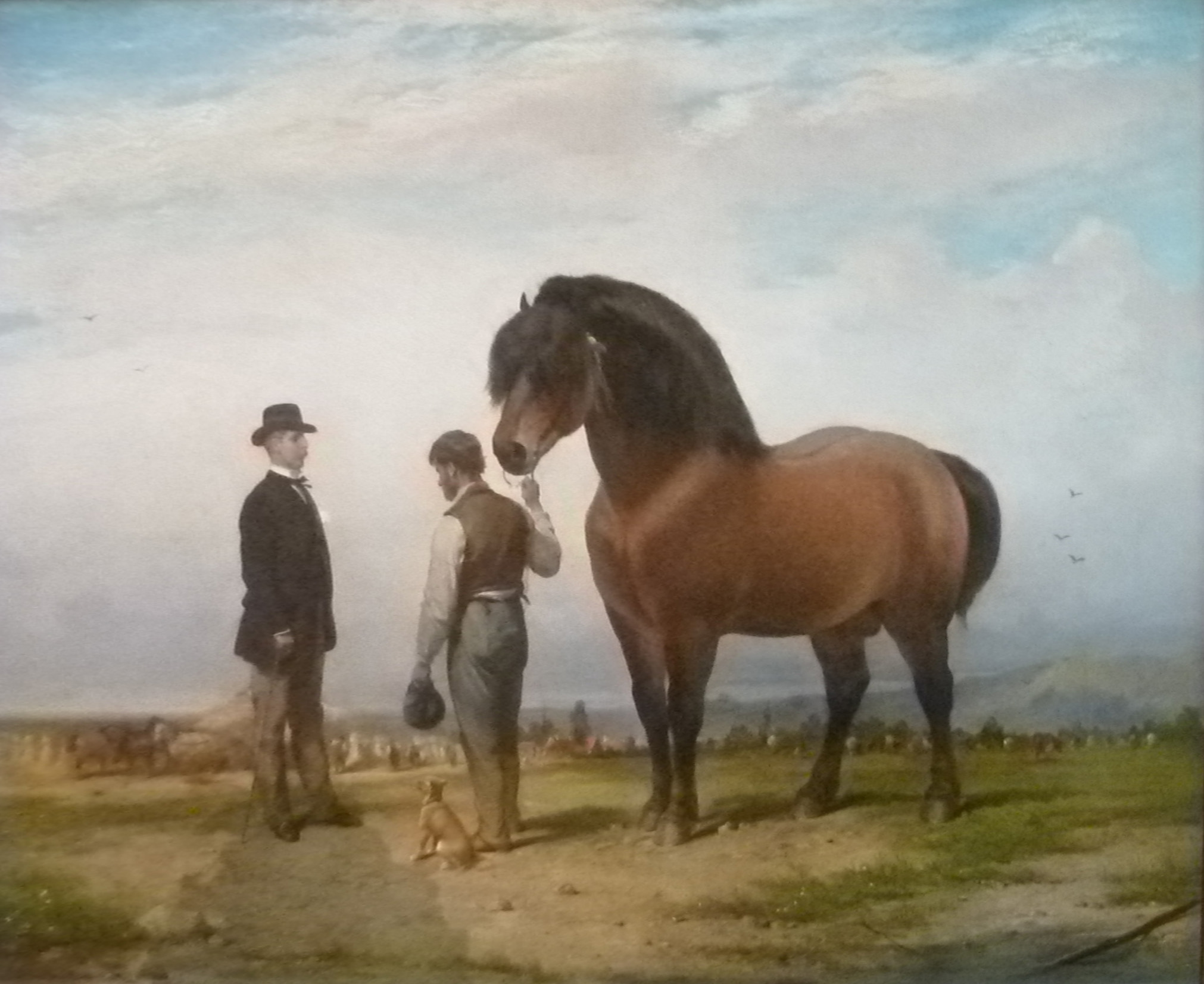 "Oogstlandschap met personages, paard en hond", olieverf op doek (75 x 95 cm) door de Belgische kunstschilder Joseph van Severdonck (1819-1905); privébezit